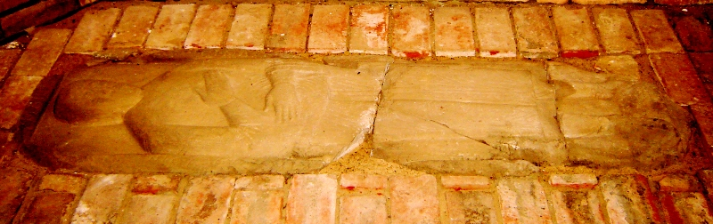 Genthin-Altenplathow, Plothograbstein